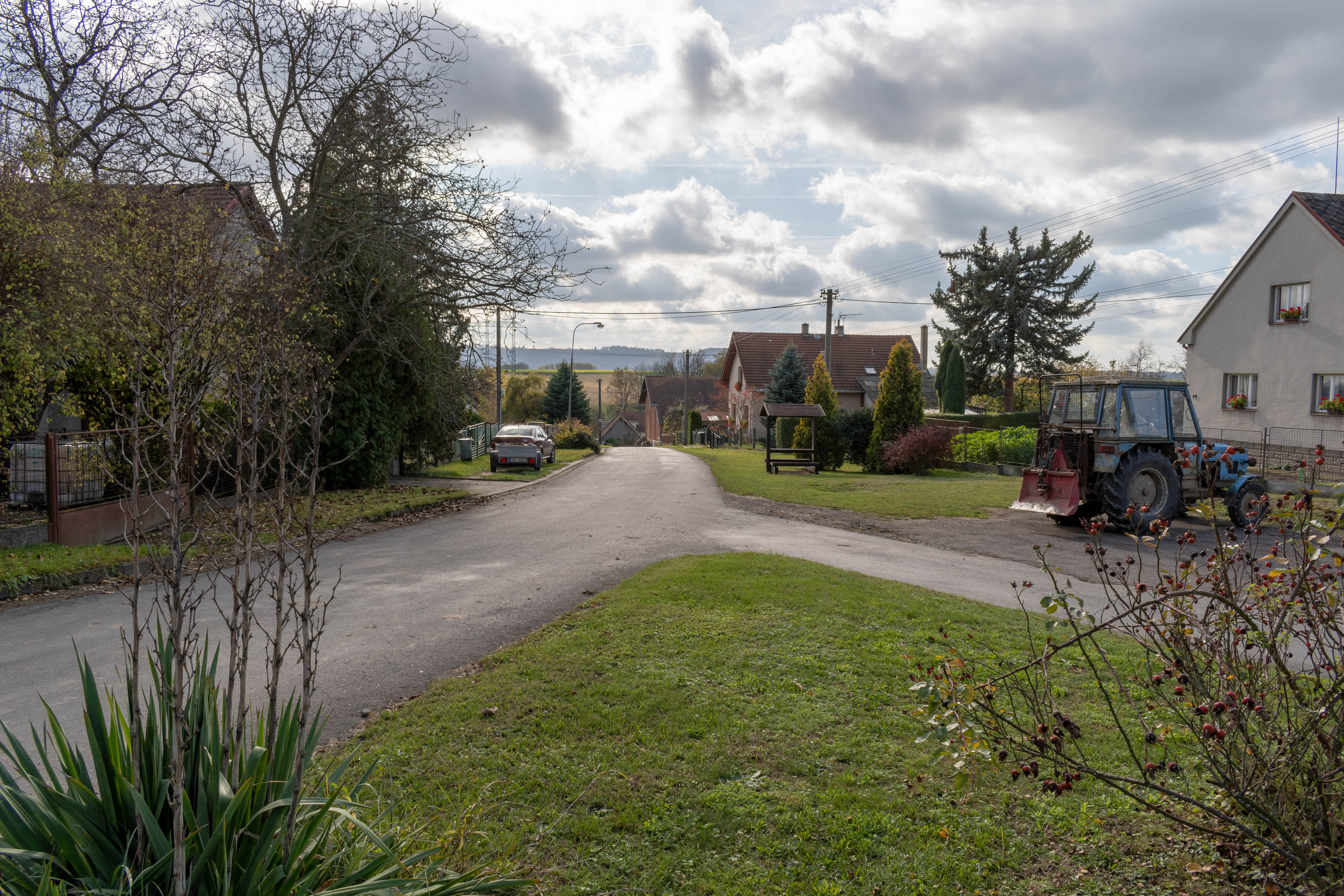 Celkový pohled na obec Dubí